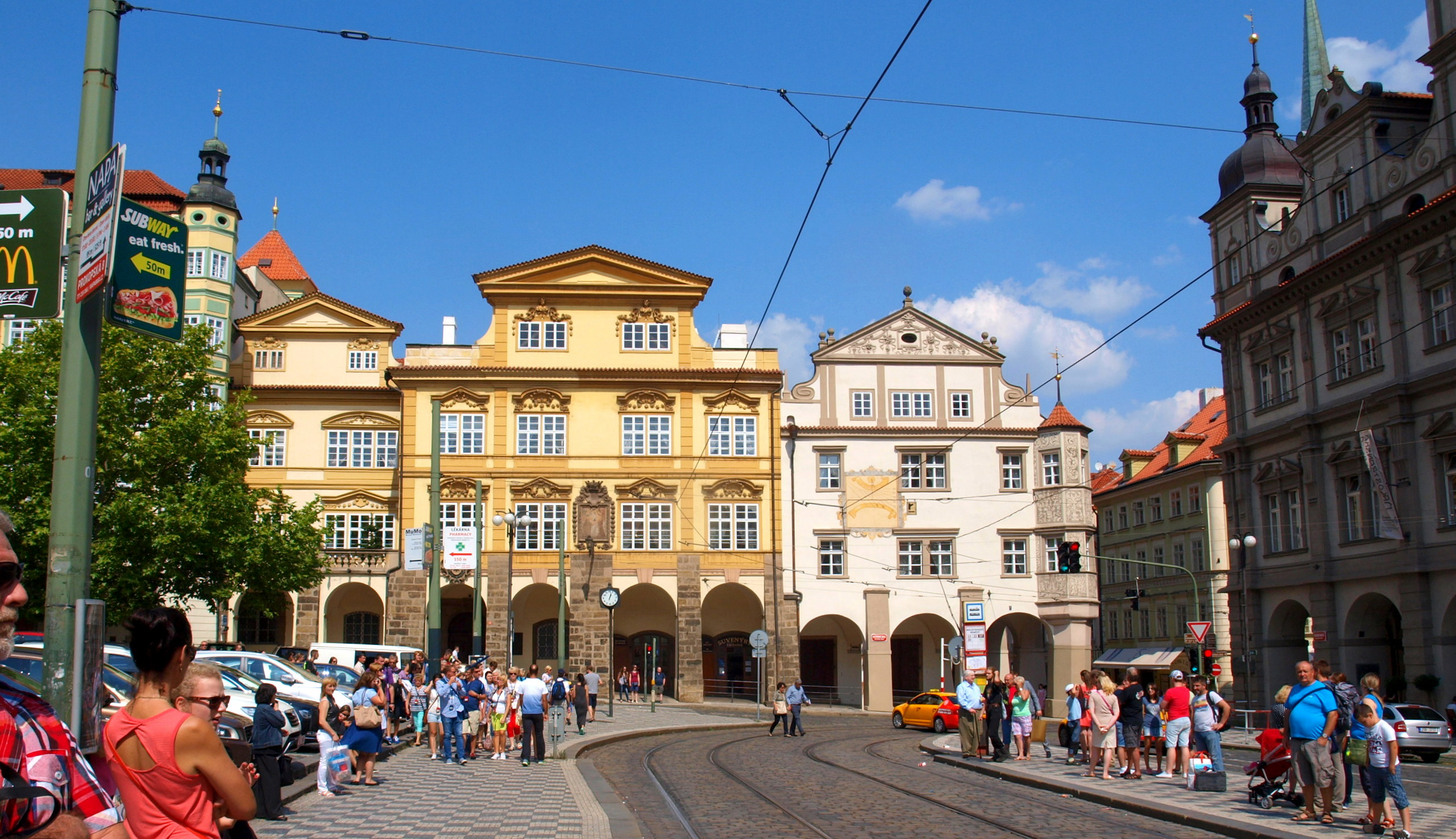 Šternberský palác na Malostranském náměstí